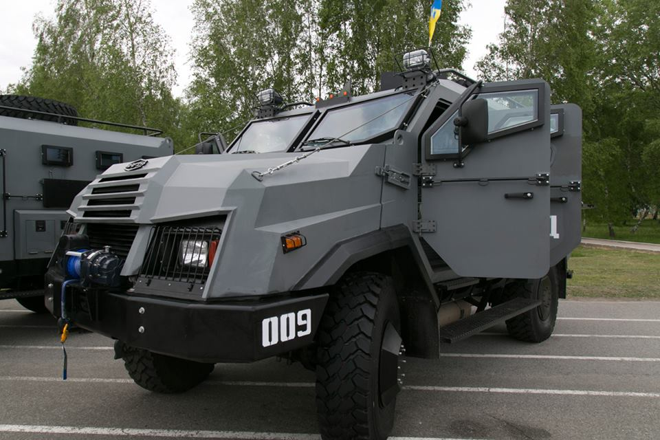 КОРД (укр. Корпус Оперативно-Раптової Дії, рус. Корпус оперативного внезапного действия) — специальное подразделение быстрого реагирования Национальной полиции Украины.